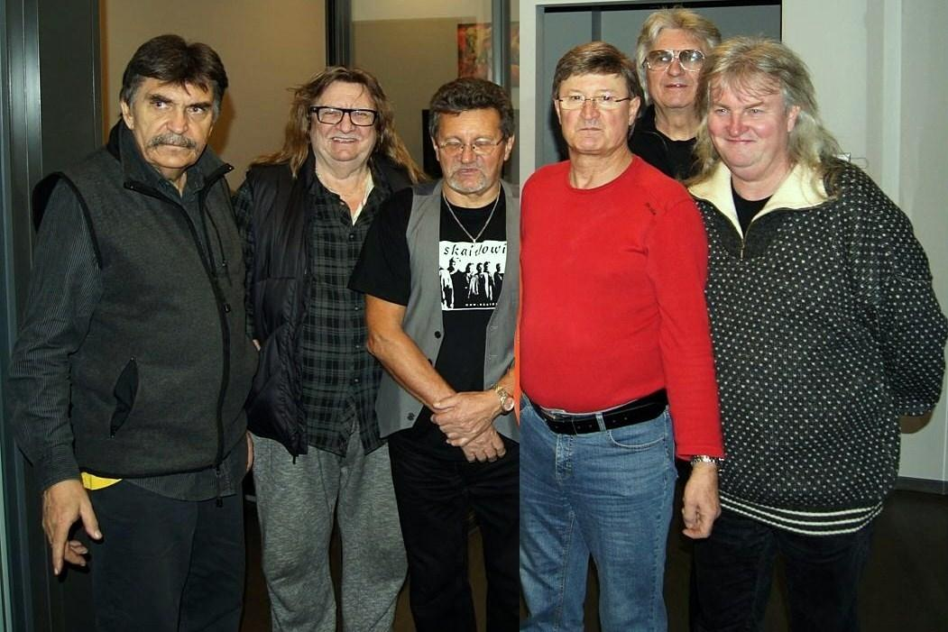 Skaldowie.